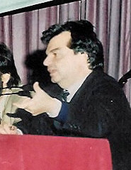 Il ministro Renato Brunetta, 2009